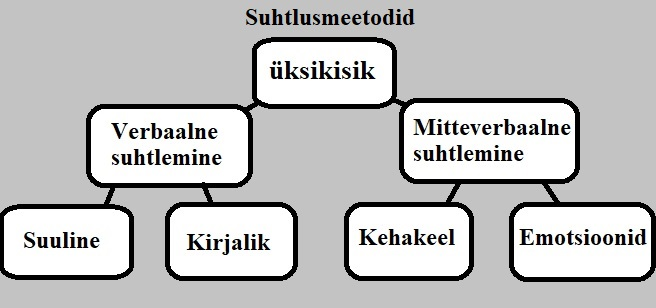 Suhtlusmeetodite jagunemine